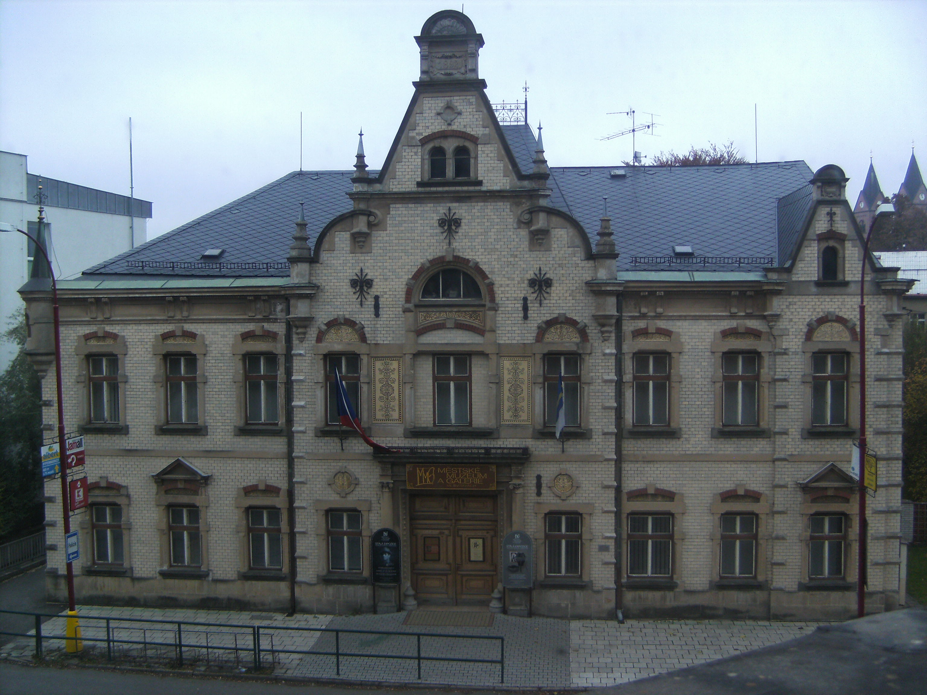 Urba muzeo en Svitavy. Fotita okaze de la 1-a Esperanta VIKIMANIO, 2011 OKT 25-30 en Svitavy.